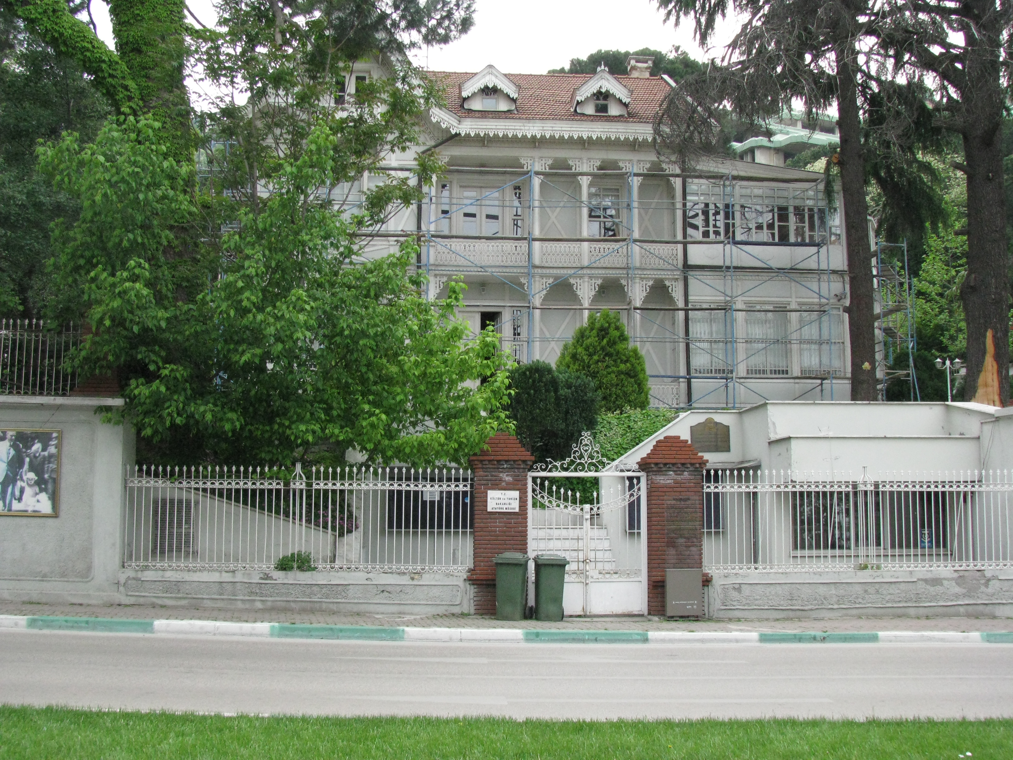 Kültür ve Turizm Bakanlığı Atatürk Müzesi